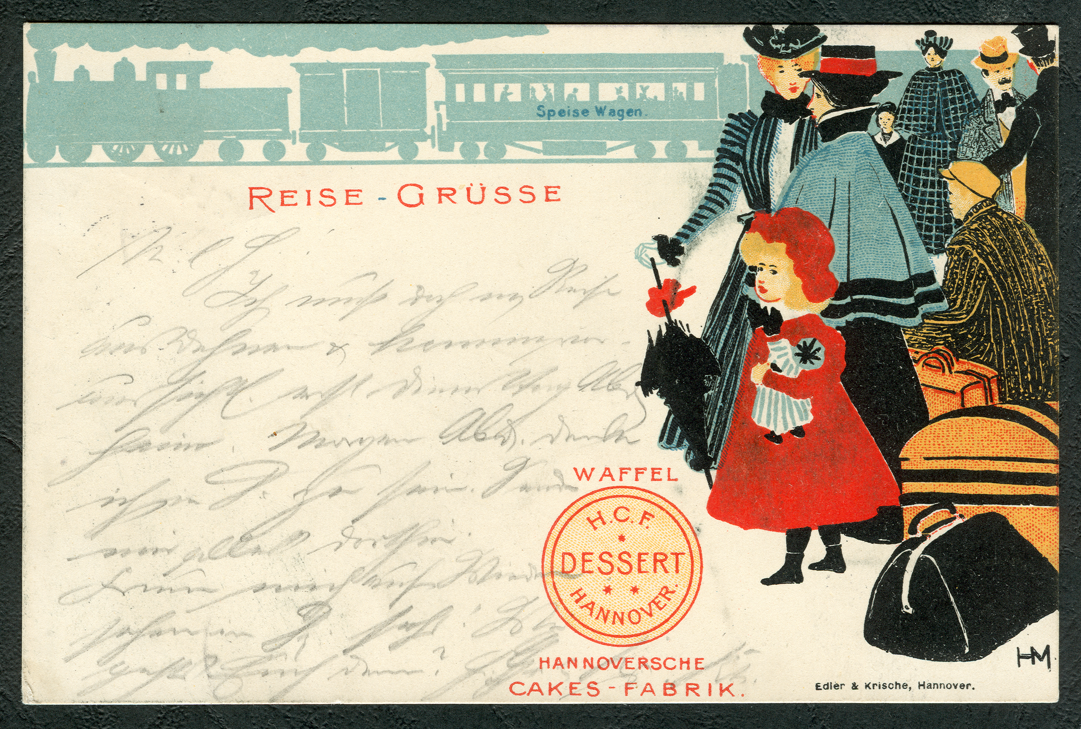 Eine von vier Künstlerkarten aus der Serie IV von Heinrich Mittag, die bis 1898 entworfen wurde und laut Reiner Meyer „in diesem Werbemedium zu den besten Bilderfindungen Mittags“ gehören. Der Firmengründer Hermann Bahlsen beauftragte den Graphiker für seine Hannoversche Cakes Fabrik für diese frühe Form der Werbung. Noch unter dem Kürzel H. C. F. wurde hier Reklame gemacht für die „Dessert Waffel“, die hier ganz bewußt den Reisenden aus der Oberschicht an den Bahnhöfen Europas angeboten wurde. Neben der Künstlersignatur „HM“ warb die Druckerei Edler & Krische aus Hannover mit ihrem guten Namen für ihren Vielfarb-Druck.